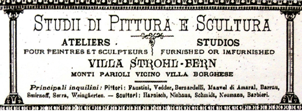 Anzeige "Studii di Pittura e Scultura" Ateliers für Maler und Bildhauer / Studios möbliert oder unmöbliert; Maler: Faustini, Elihu Vedder, Henrique Bernardelli, Manvel di Amaral, Laureà Barrau, Smirnoff, Serra, Pedro Weingärtner; Bildhauer: Harnisch, Charles Henry Niehaus, Schmidt, Neumann, Barbieri; in Guida Monaci, Guida commerciale di Roma, XVIII, 1888, page 749